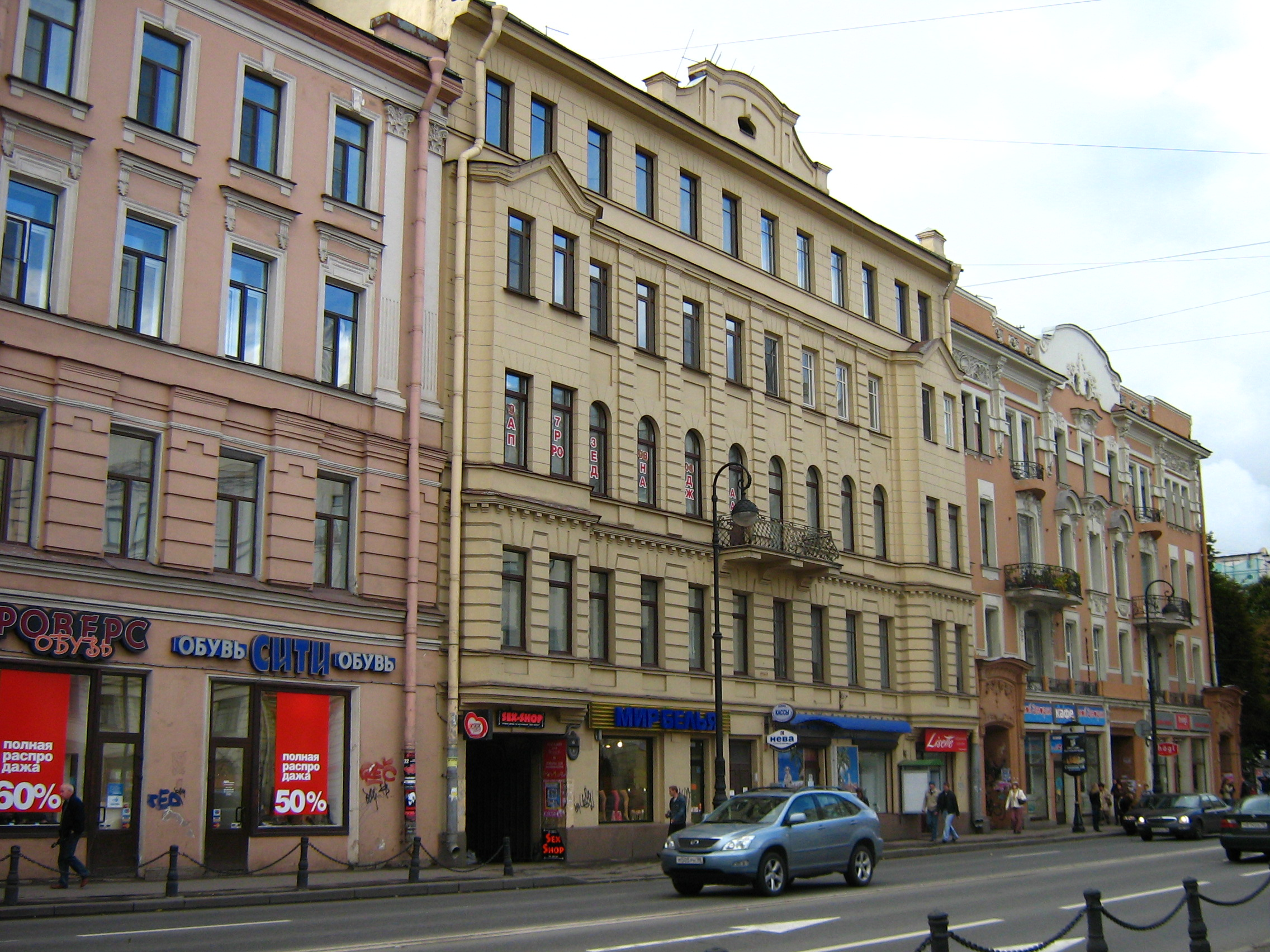 Kamennoostrovski Prospekt, 4,6,8